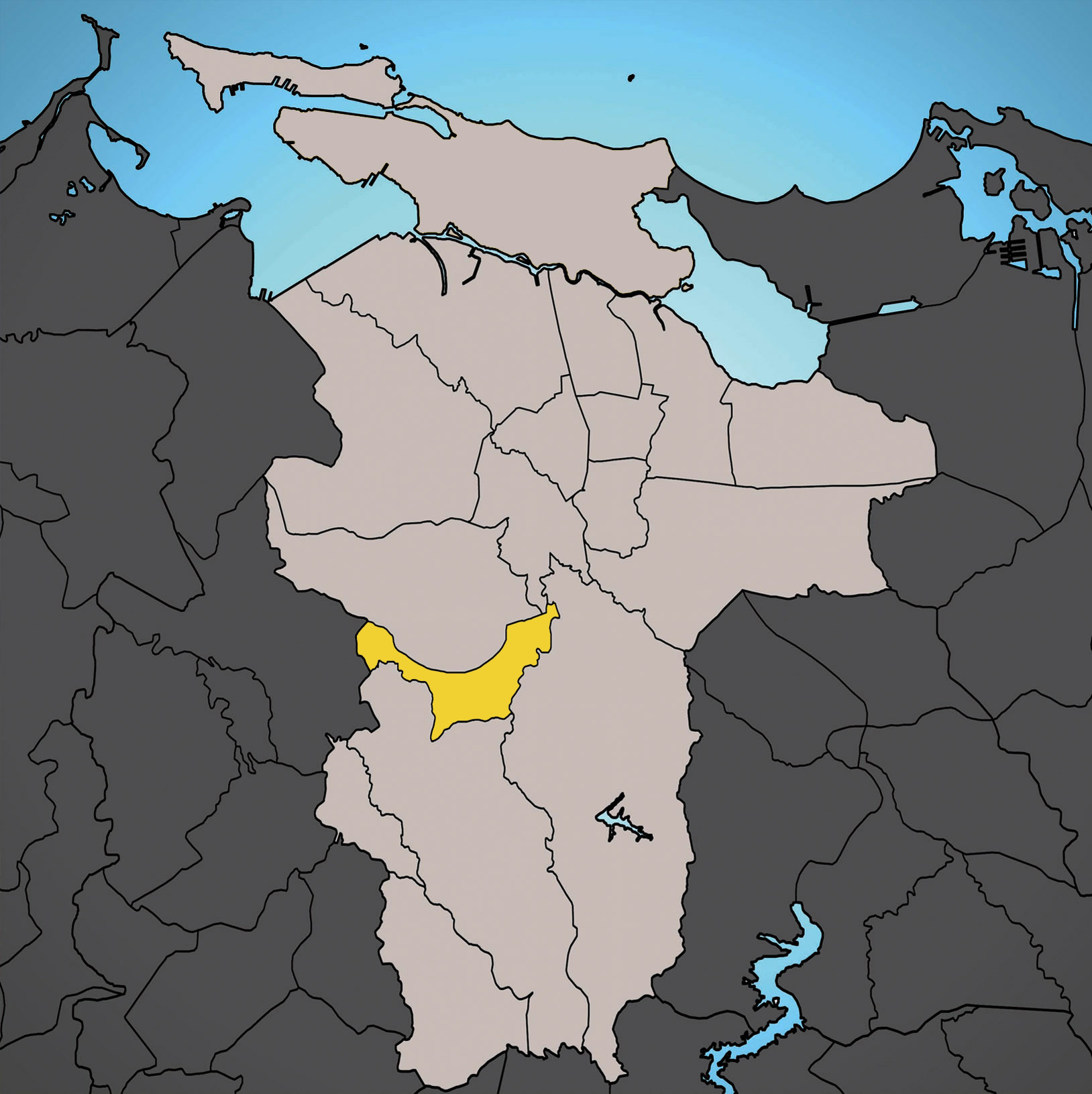 Monacillo Barrio